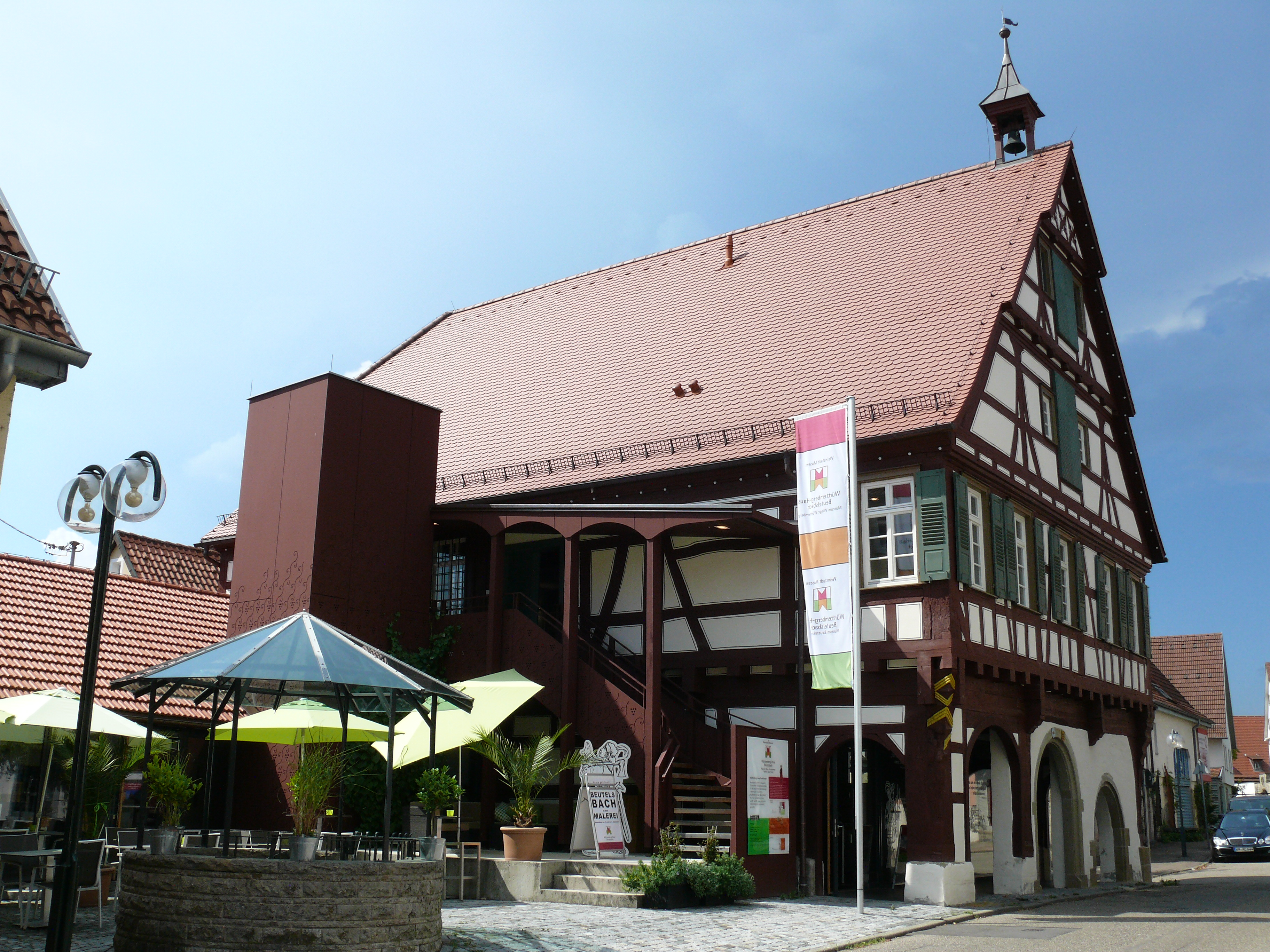 Das alte Rathaus in Weinstadt-Beutelsbach, das heutige Württemberg-Haus. Im Erdgeschoss befindet sich das Museum Bauernkrieg und im Obergeschoss das Museum Wiege Württembergs.